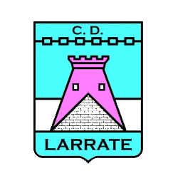 Escudo del equipo de fútbol de la localidad